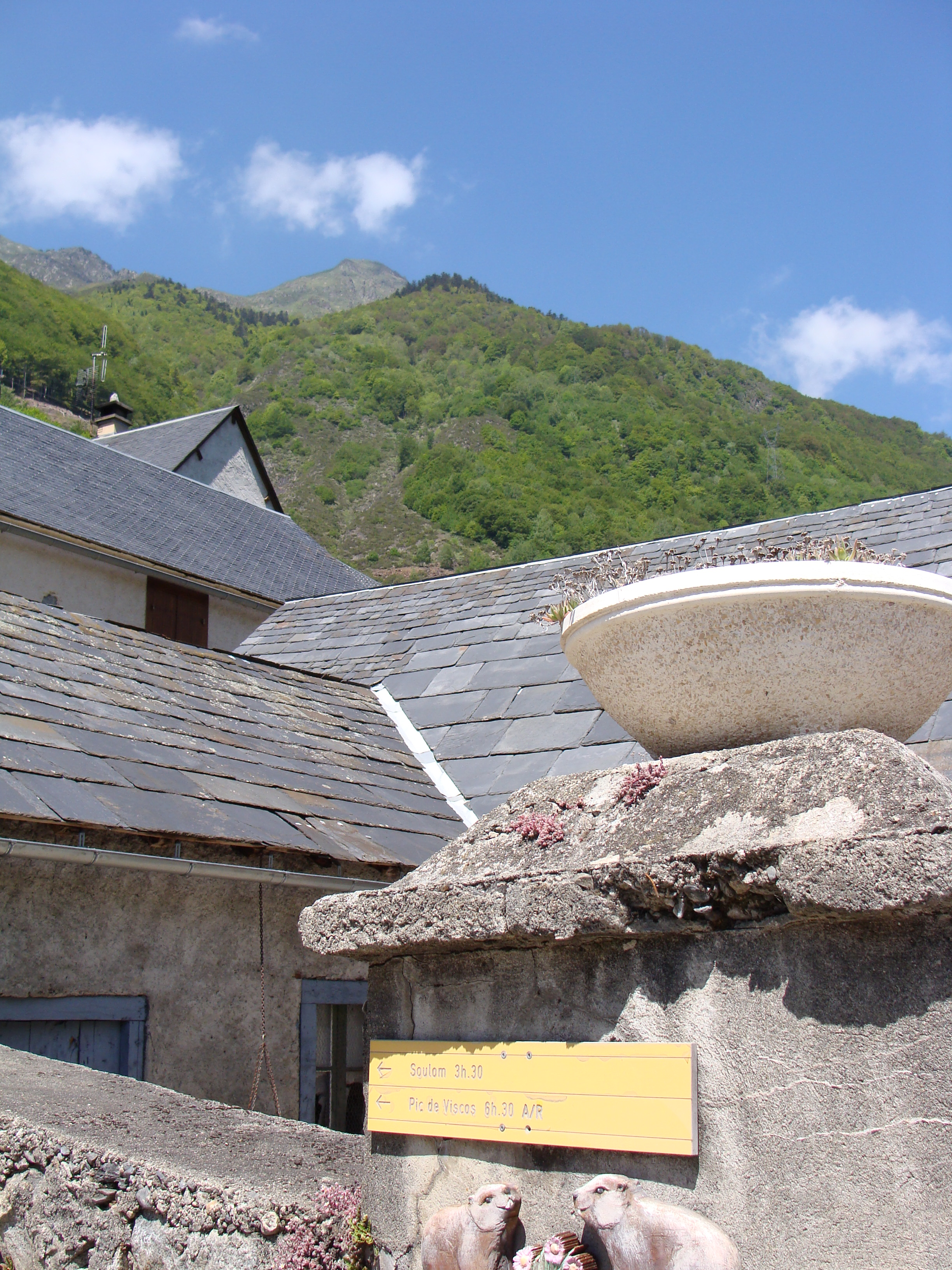 Viscos - Vue sur le Pic de Viscos 2141m